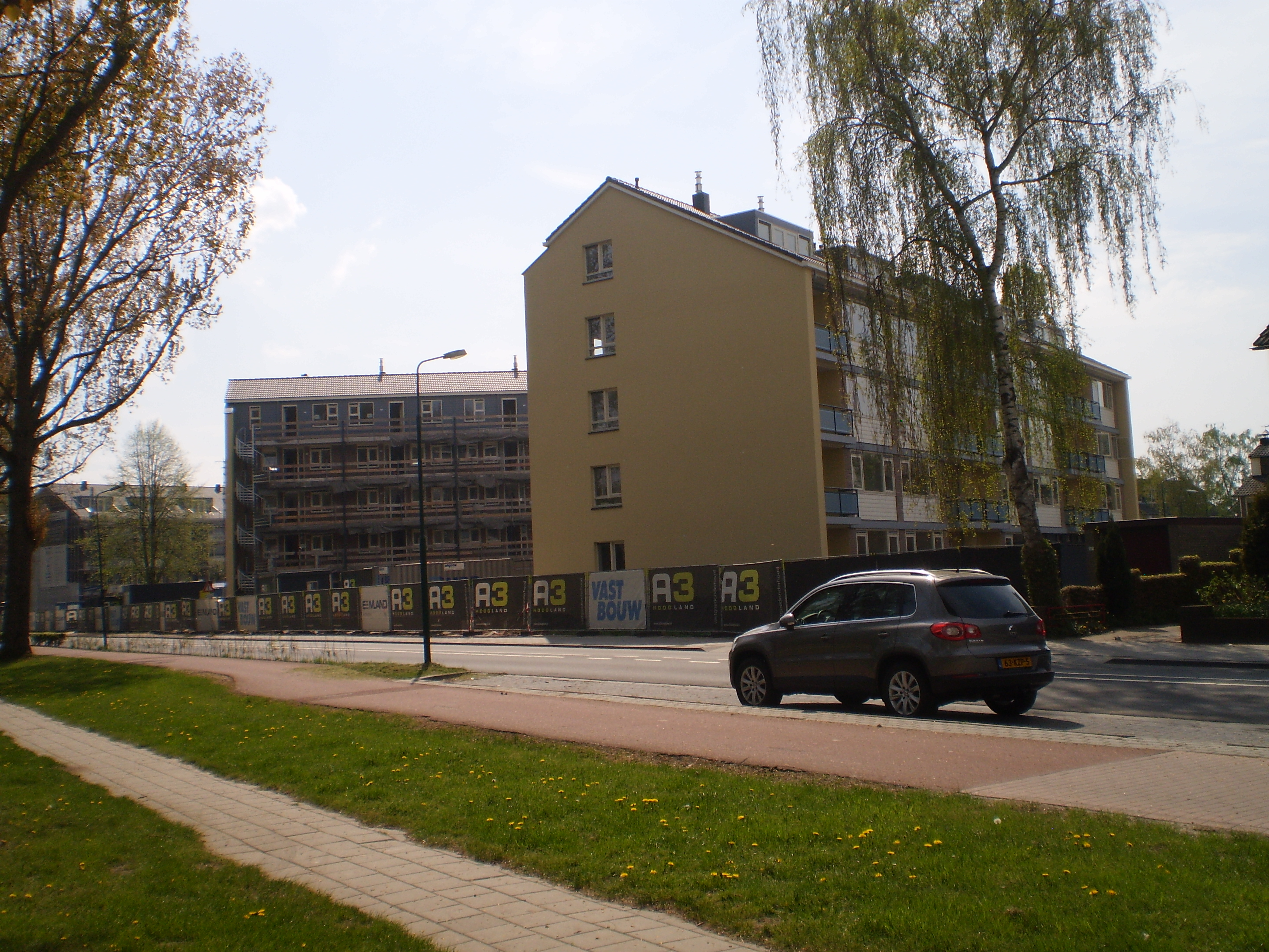 Vanaf de Geerenweg aan de buitenkant van Baarn